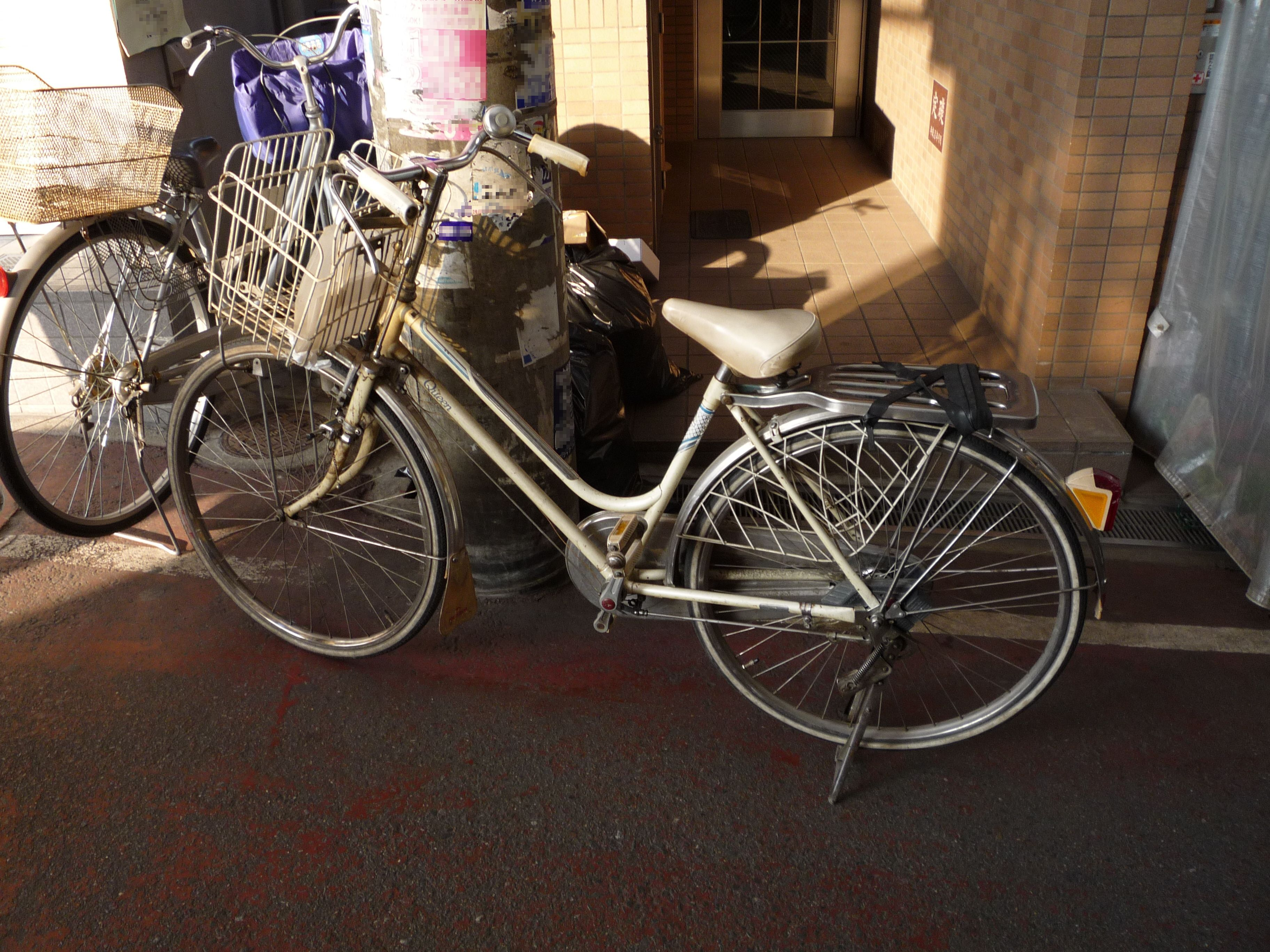 日本の古い軽快車 婦人用 1980年代前期